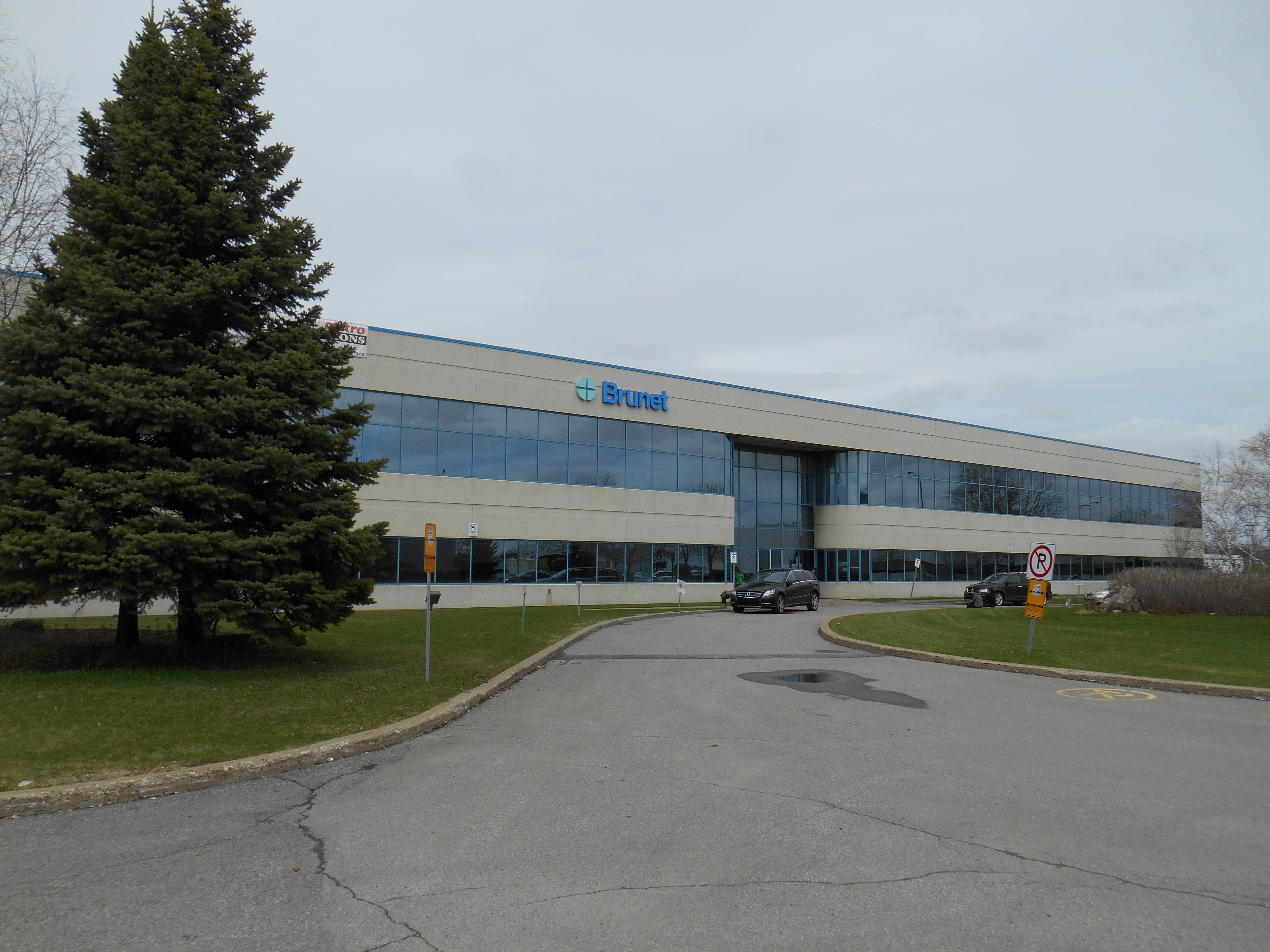 Entrepôt de Brunet, 12225, boulevard Industriel, Montréal